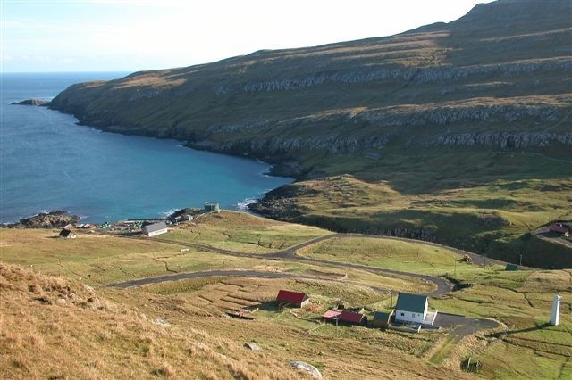 Víkarbyrgi, Faroe Islands